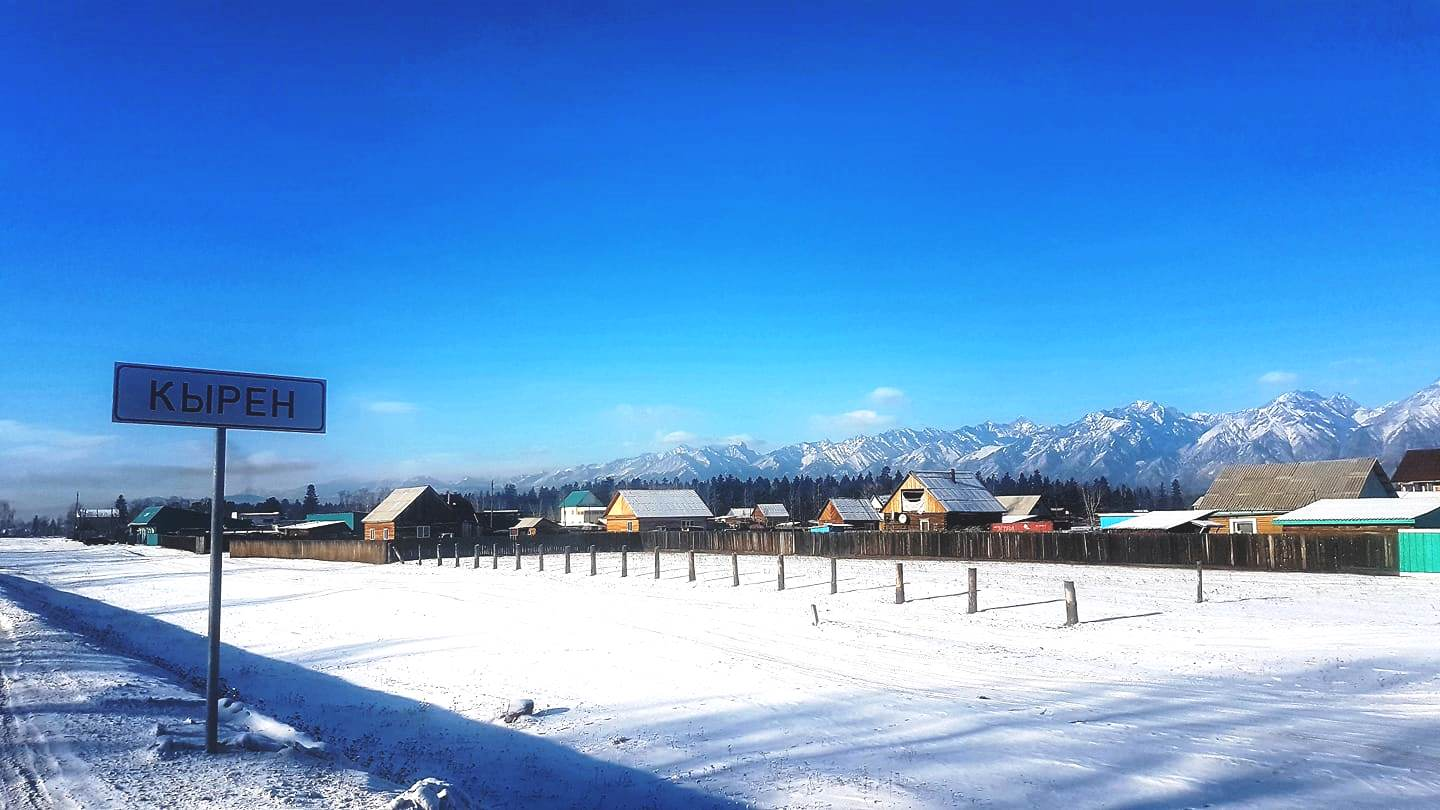 Kyren in winter